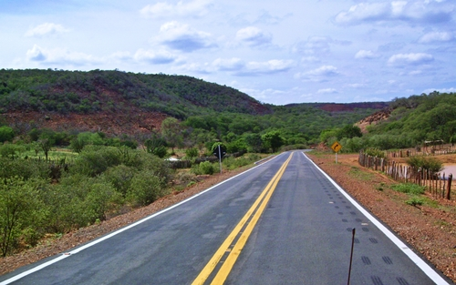 Trecho da BR-020 entre João Costa e São João do Piauí